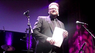 Adam Alsing på Bemanningsgalan.